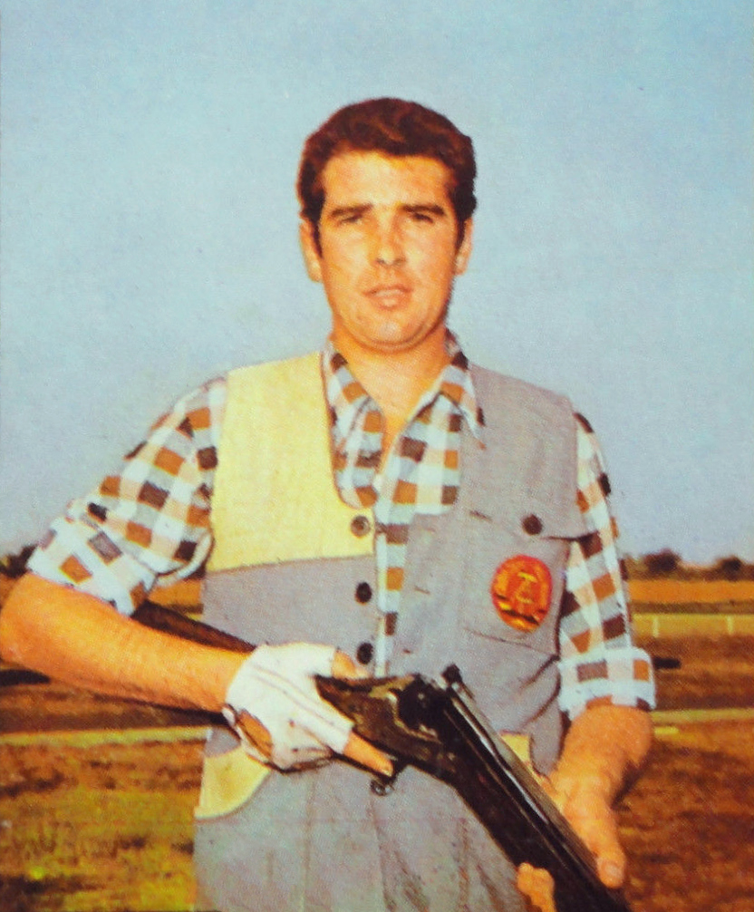 MUNCHEN 72-Figurina-Stickers-Panini-N° 166-HENKE recuperata